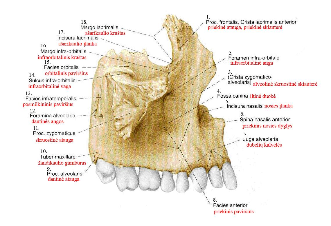 Viršutinio žandikaulio vaizdas iš priekio